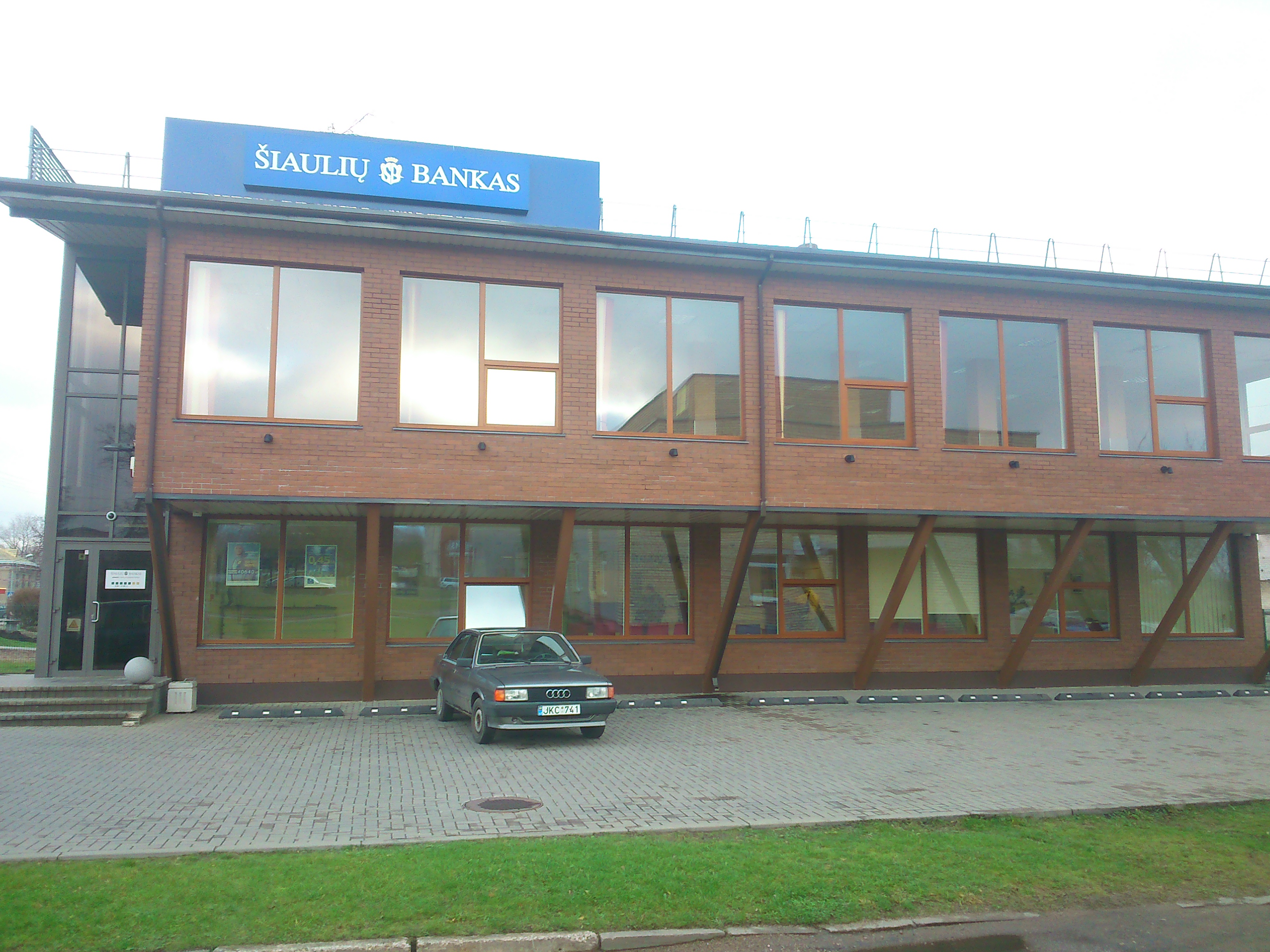 Siauliu bankas, Jonava